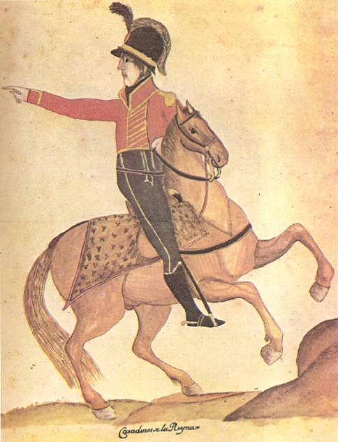 Uniforme del 4° Escuadrón del Regimiento de Húsares de Pueyrredón (Cazadores de la Reina o de Herrera)